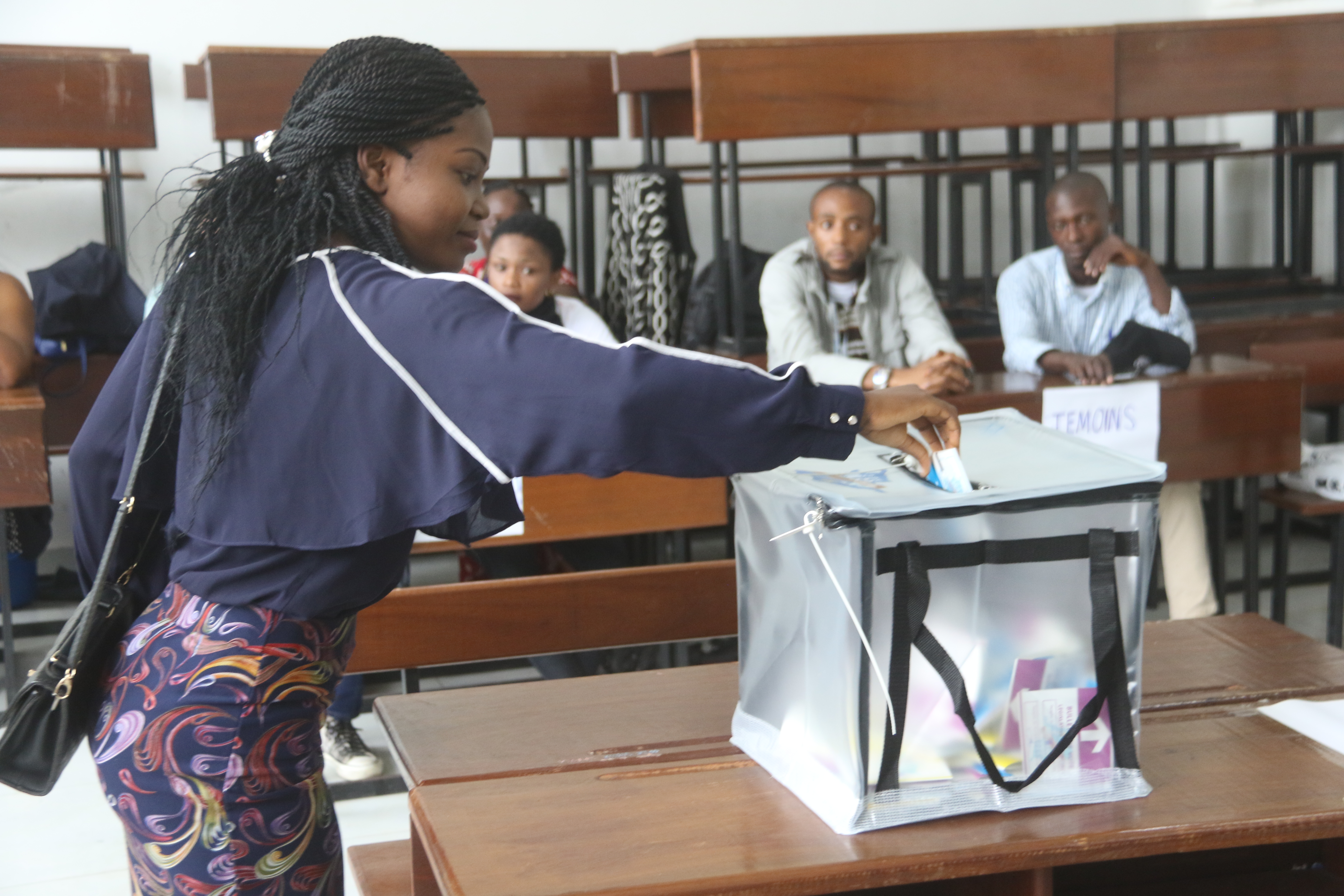 Femme votant à Kinshassa devant des scrutateurs, au cours des élections du 30 décembre 2018 en RDC